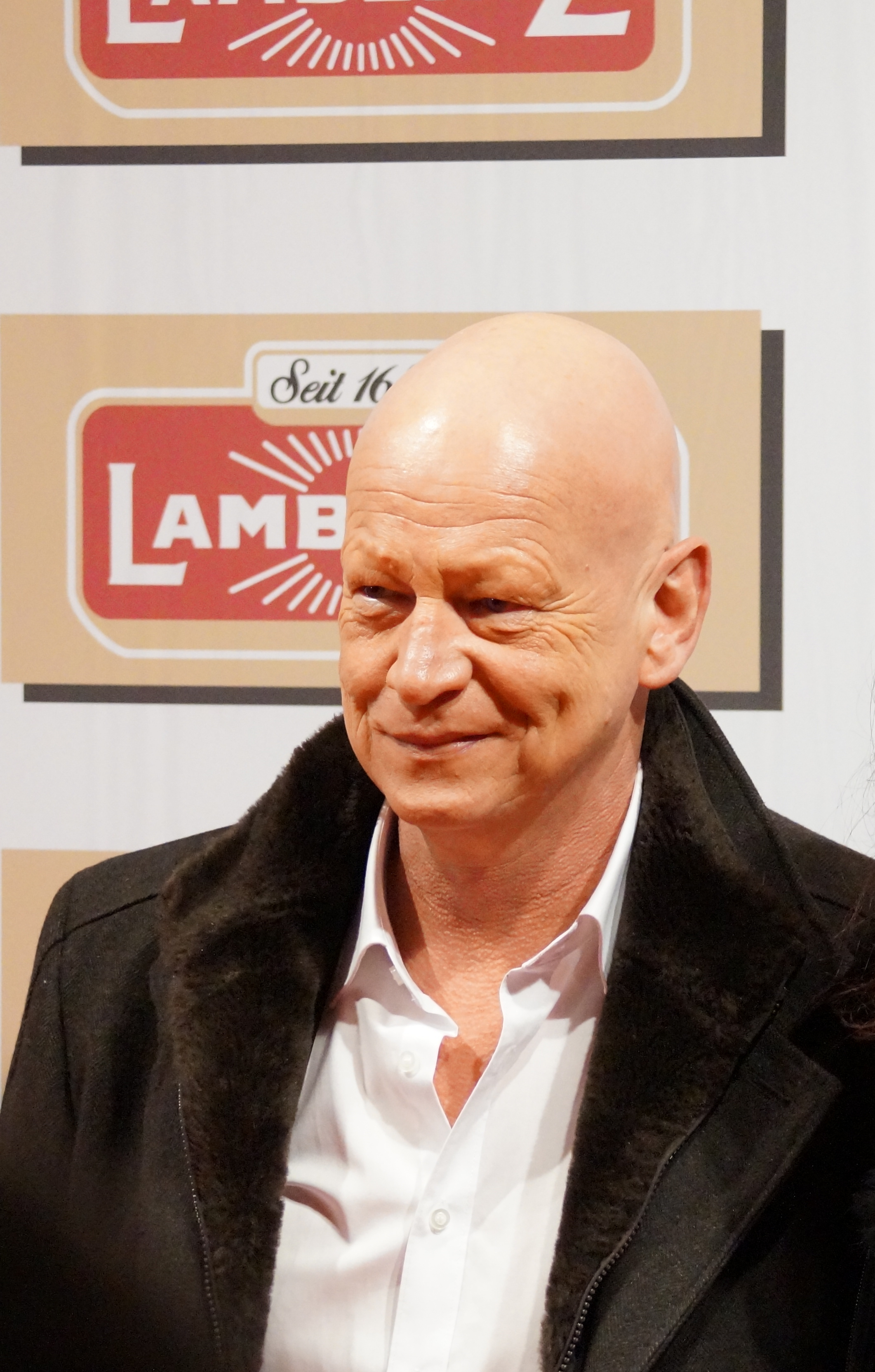 "Lambertz Monday Night 2015" im "Alten Wartesaal" in Köln, am 02.02.2015.